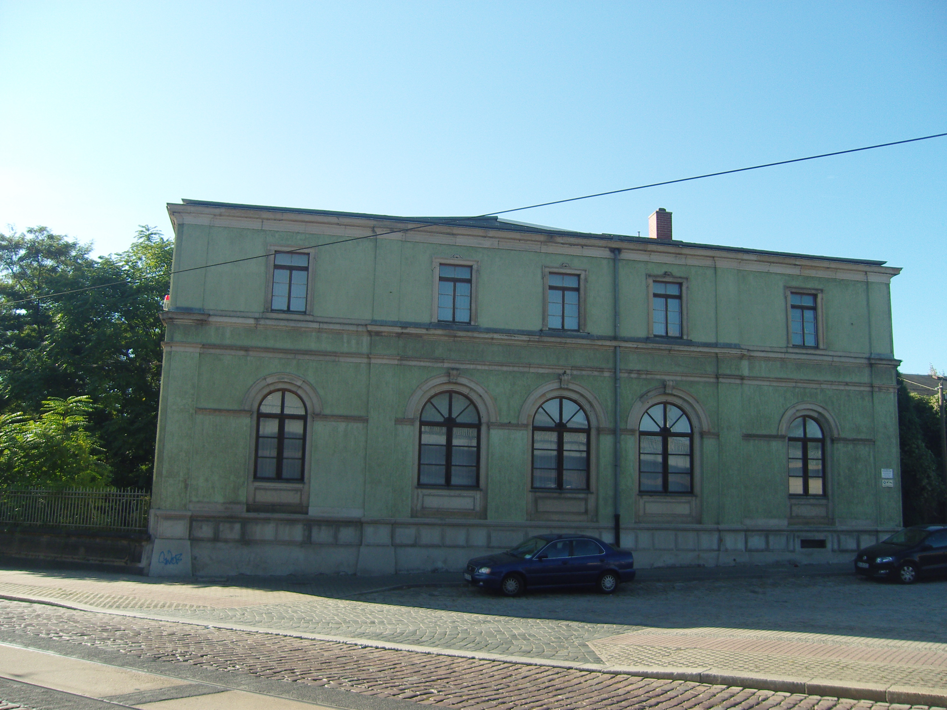 Denkmalgeschützter ehem. Leipziger Bahnhof in der Eisenbahnstraße 1 in Dresden